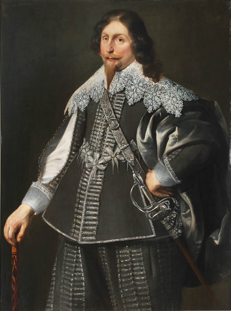 Johan van Rechteren († 1641)